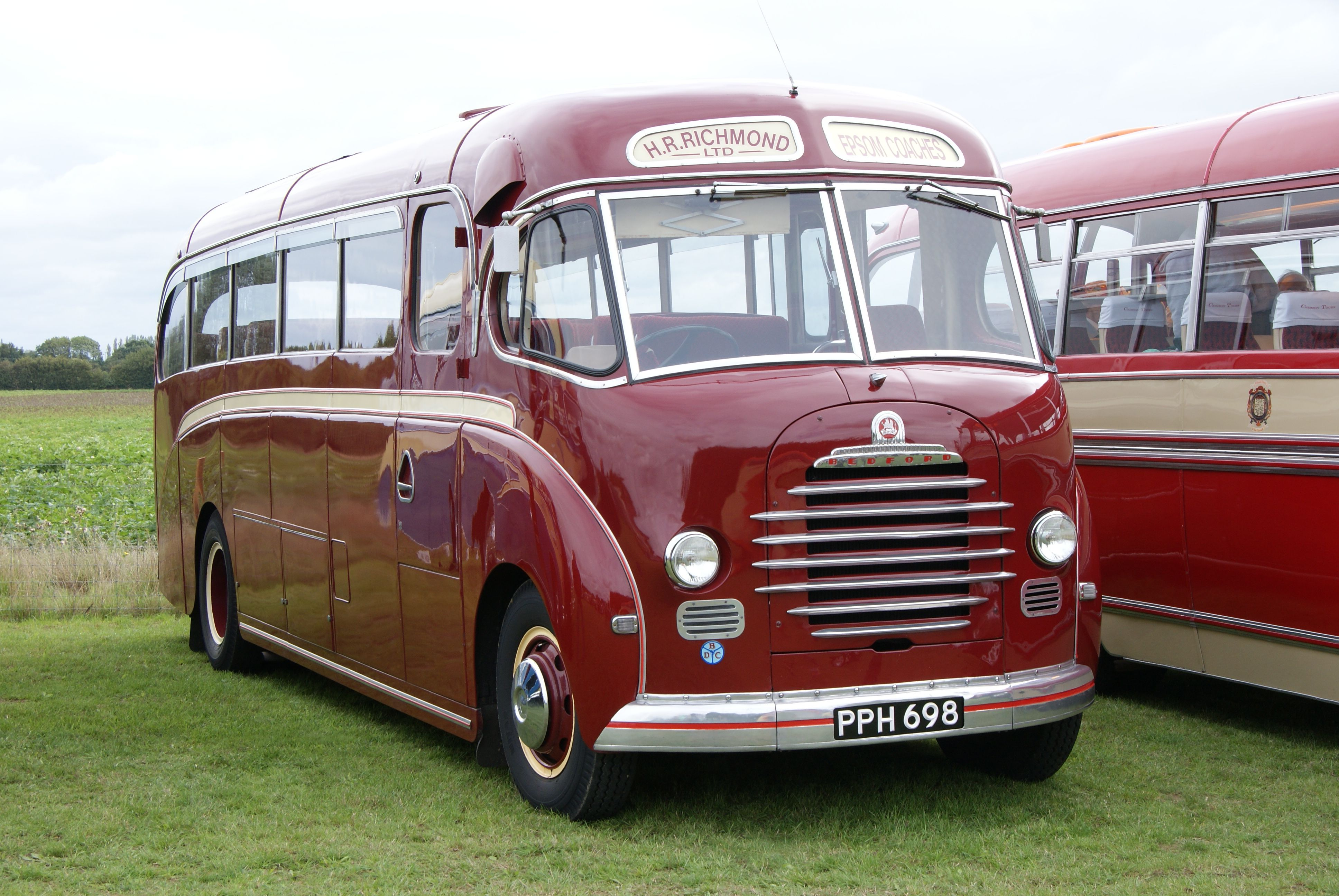 PPH698-1 290810 CPS